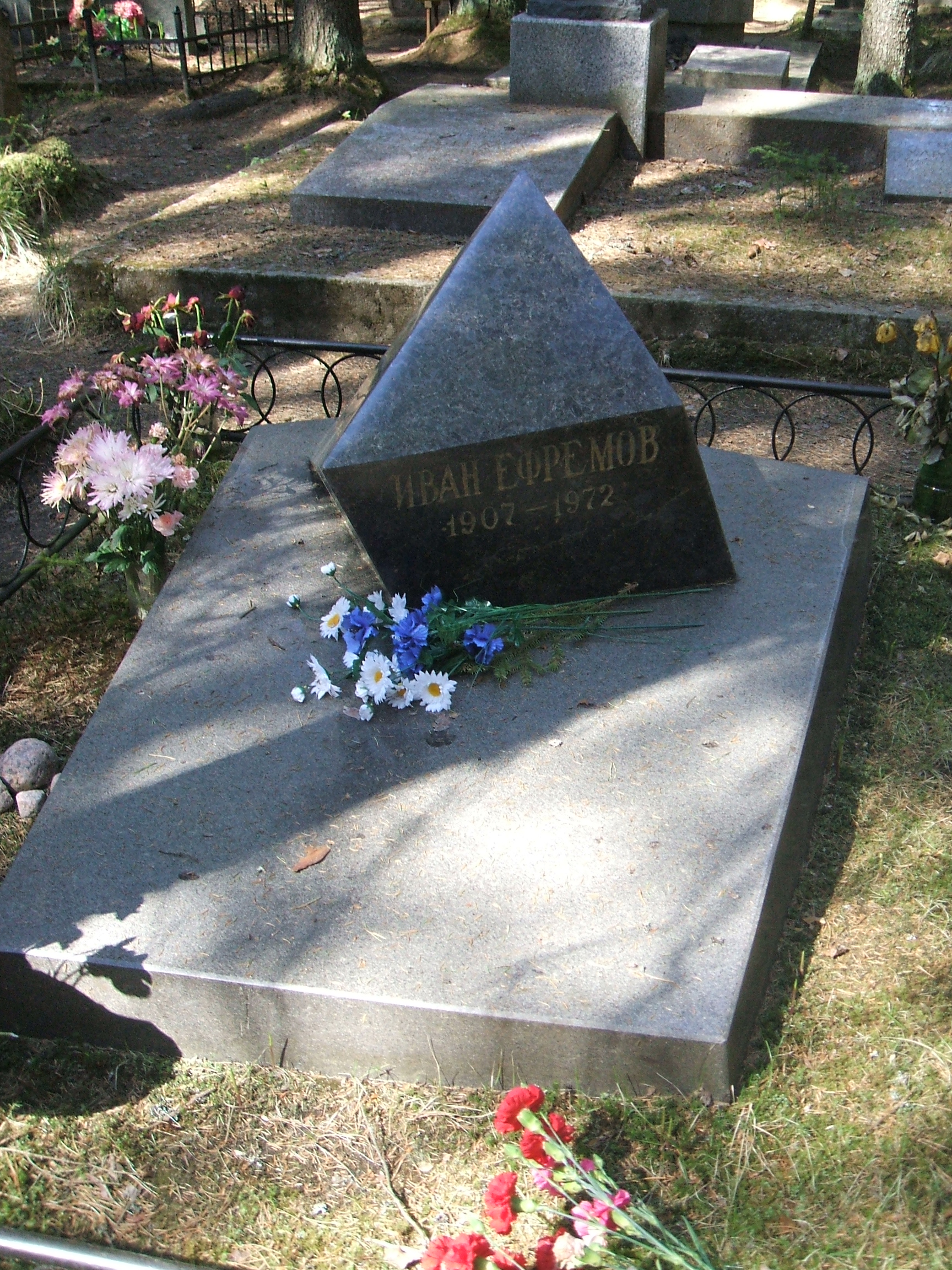 Памятник И. А. Ефремову на Комаровском Некрополе СПб фед.ур.охраны